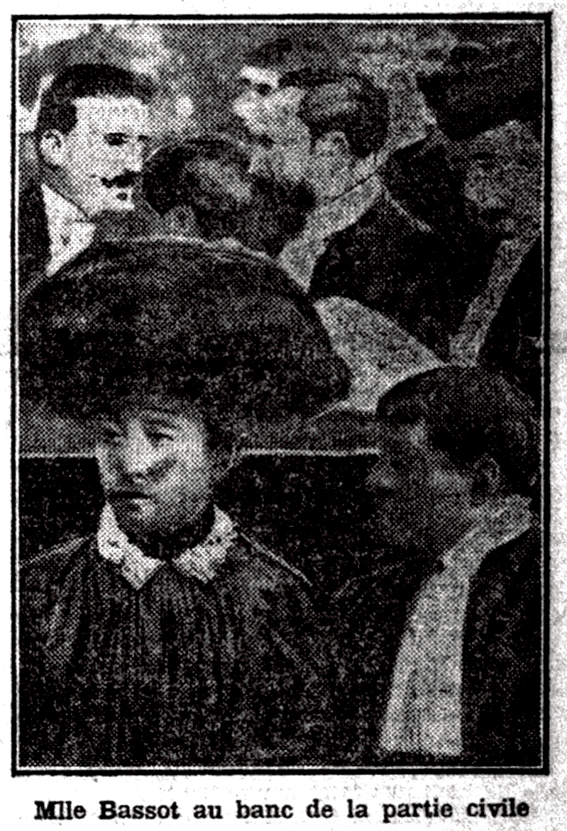 Photo de presse